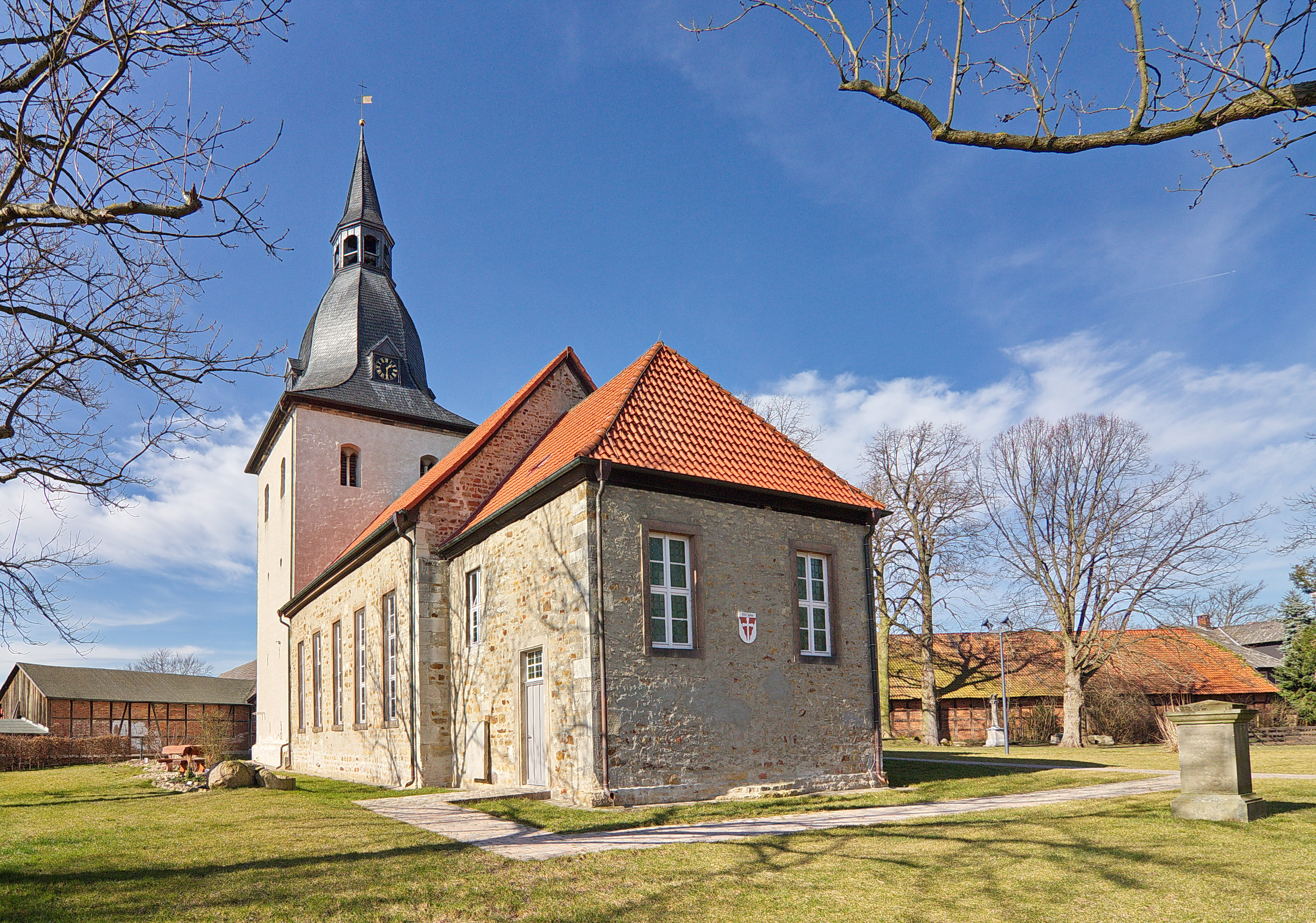 St.-Adrian-Kirche in Heiligendorf (Wolfsburg), Niedersachsen, Deutschland